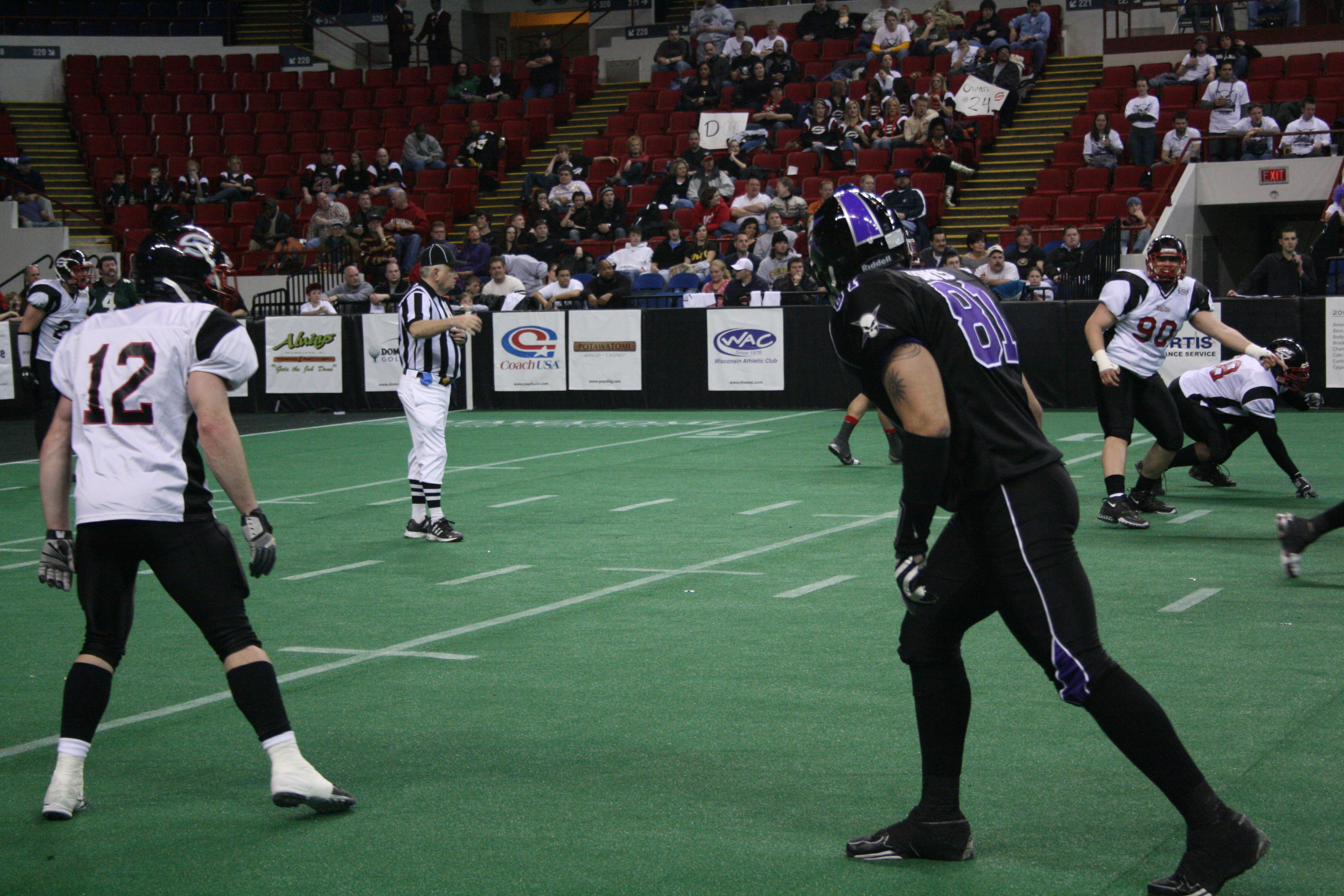 Brett Barnes guarding Reggie Davis